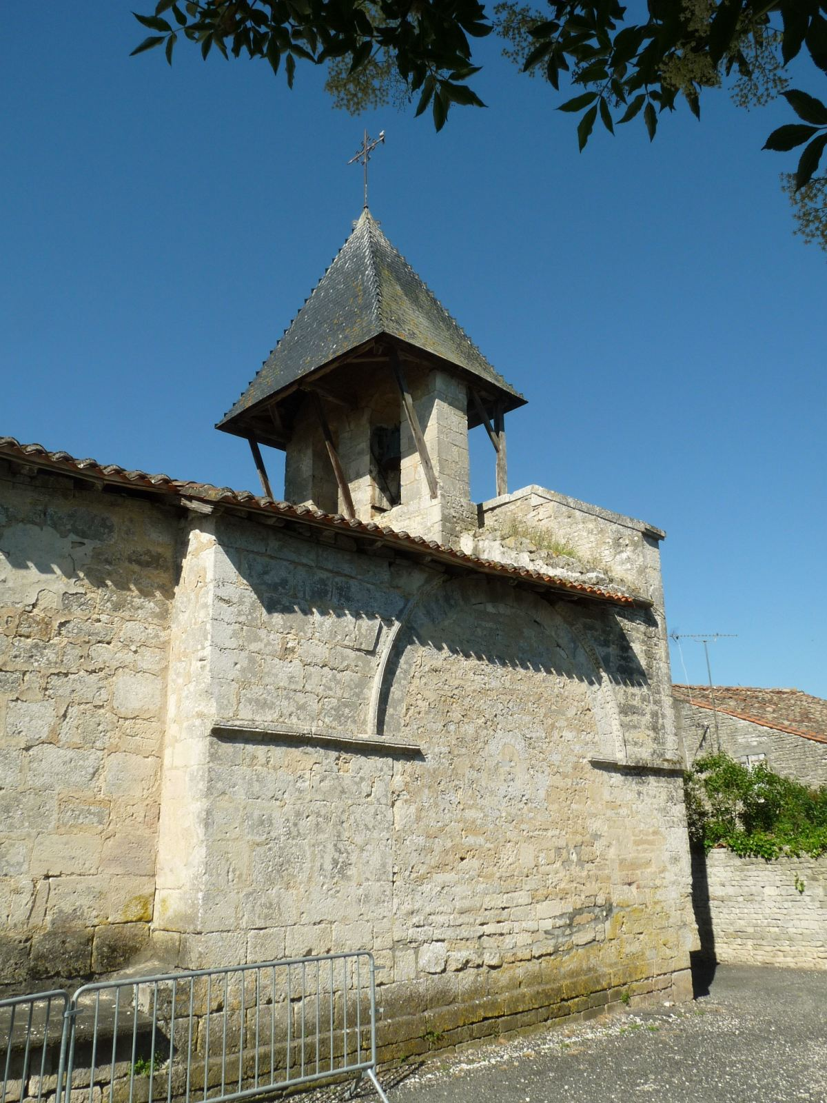 église de Tourriers, Charente, France